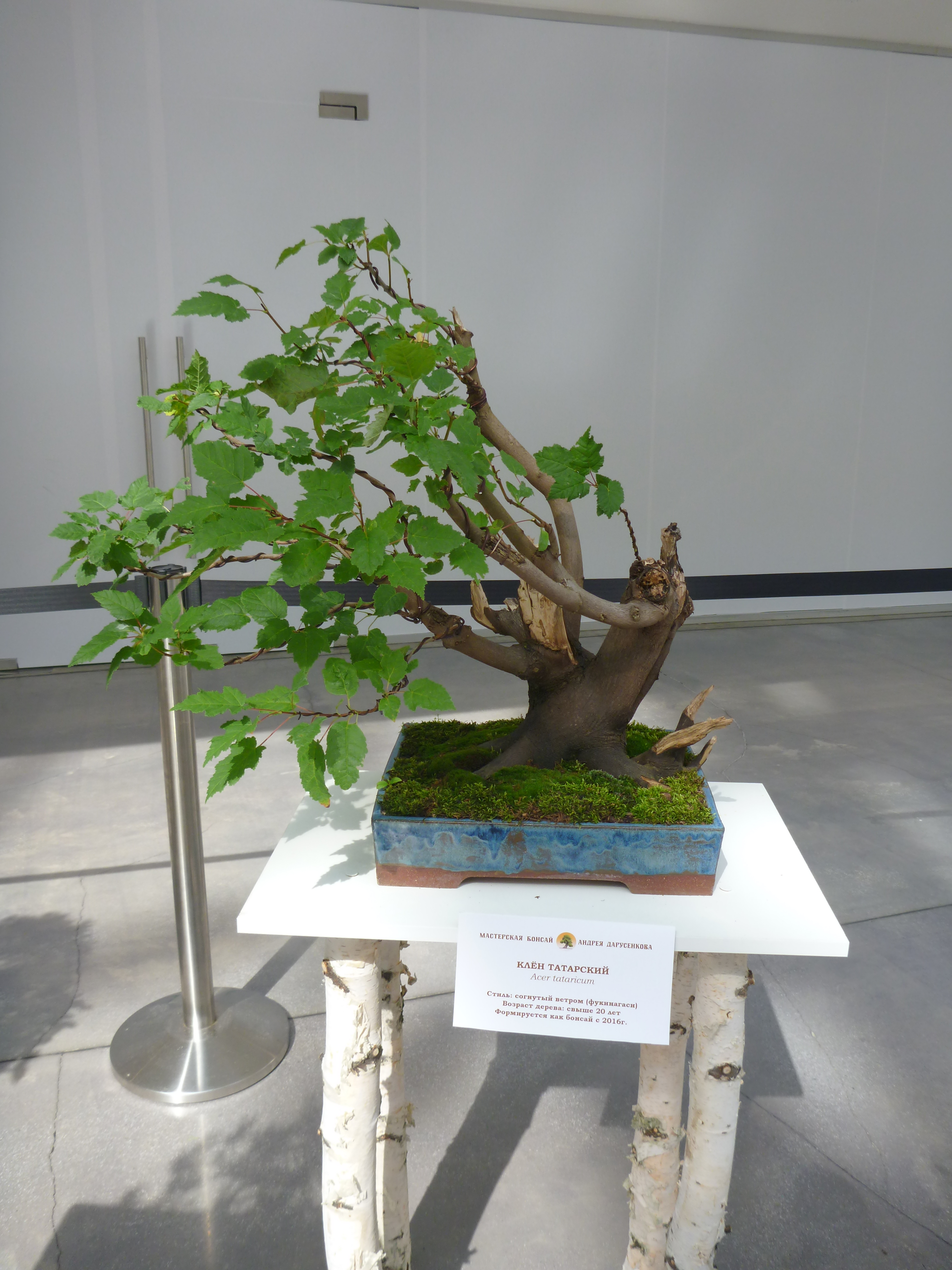 Клен татарский в форме бонсай в Ельцин-центре 2019 год